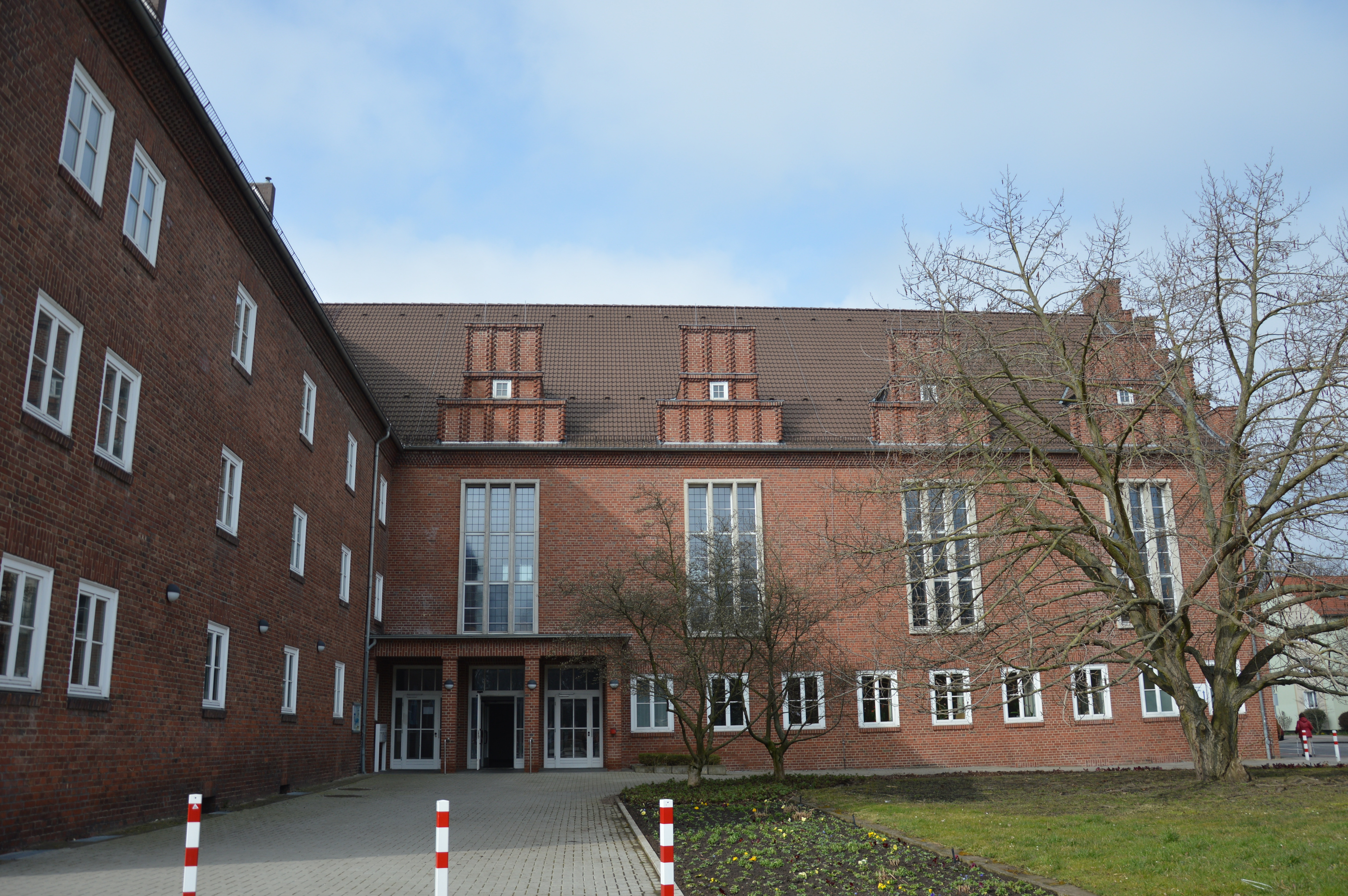 Haus Leipziger Straße 43